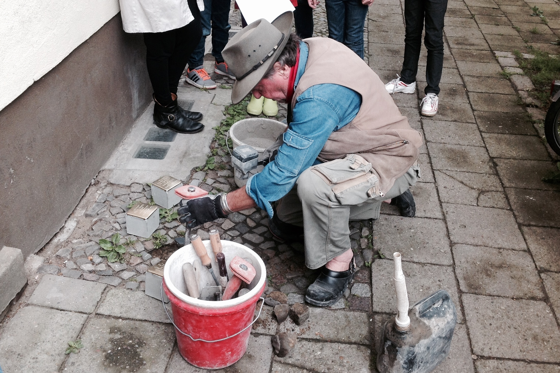 Stolpersteinverlegung für die Familie Hirsch in der Raabestraße 11 in Berlin-Prenzlauer Berg, Deutschland